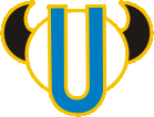 vychází ze znaku woodcraftu s přidáním modrého (čistá obloha) U(nie)